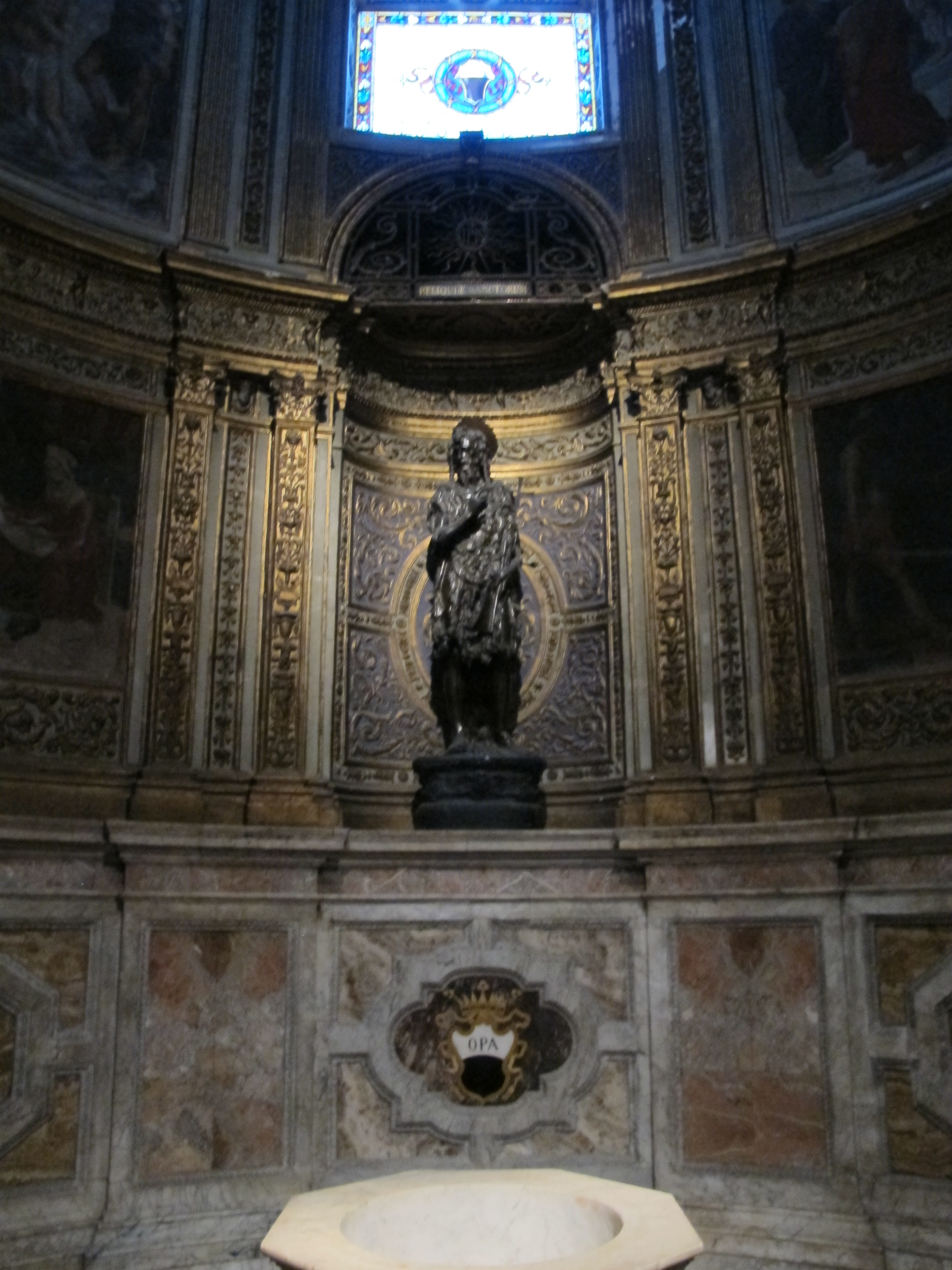 Cappella di s. giovanni, siena